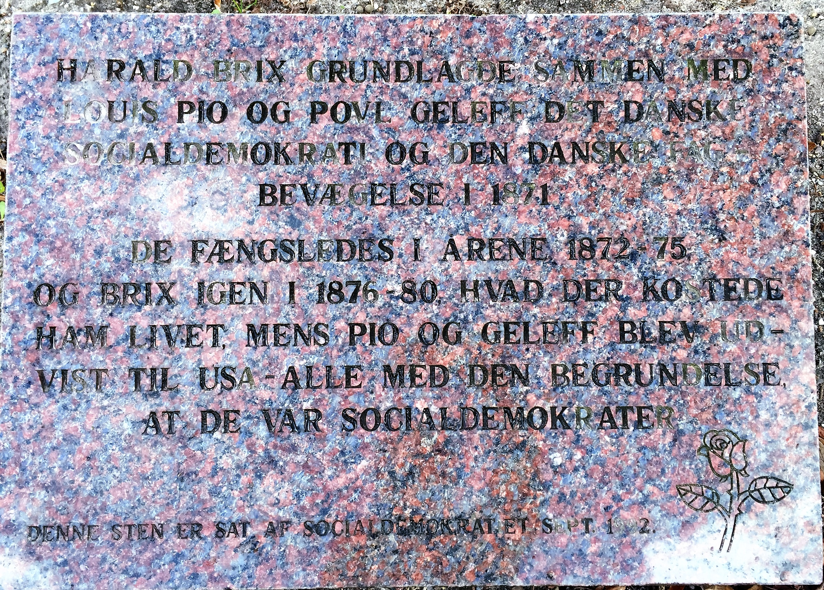 Almen Kirkegård, Aalborg